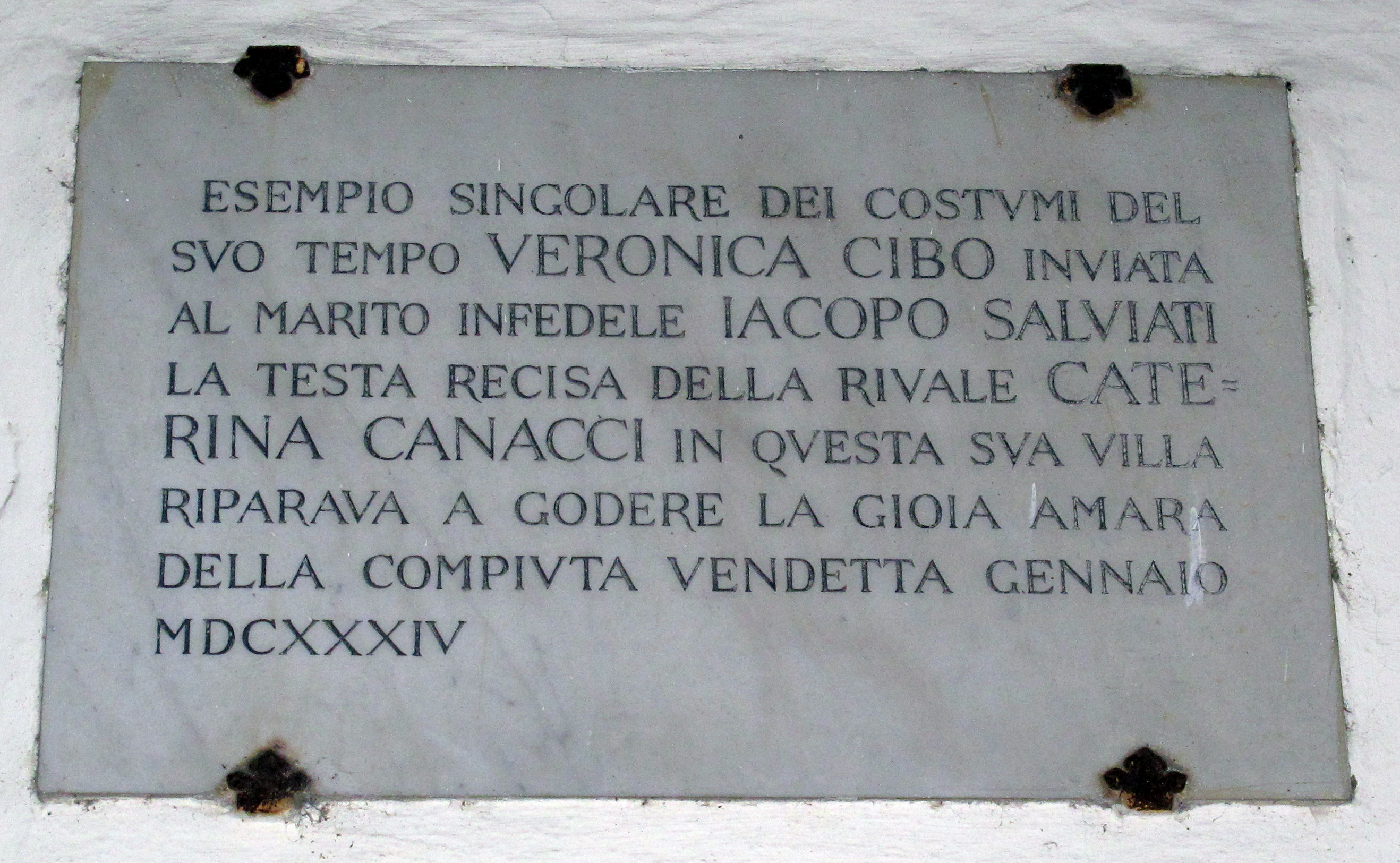 Villa San Cerbone (nucleo dell'ospedale Serristori) a Figline Valdarno, provincia di Firenze